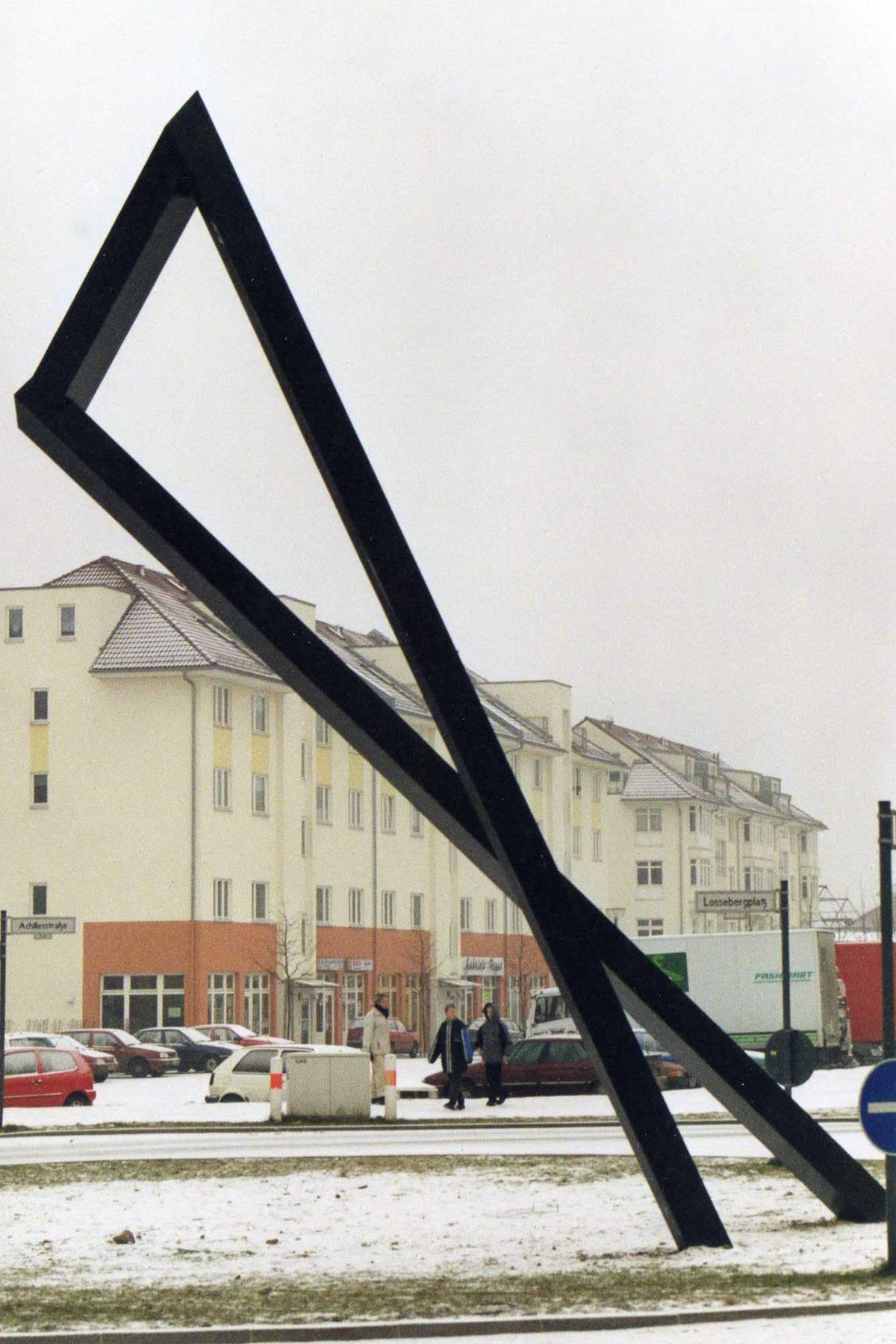 Rüdiger Preisler, Stahlskulptur "Paar", Höhe 8,5 Meter - Kunst im öffentlichen Raum: Lossebergplatz, Berlin 1999